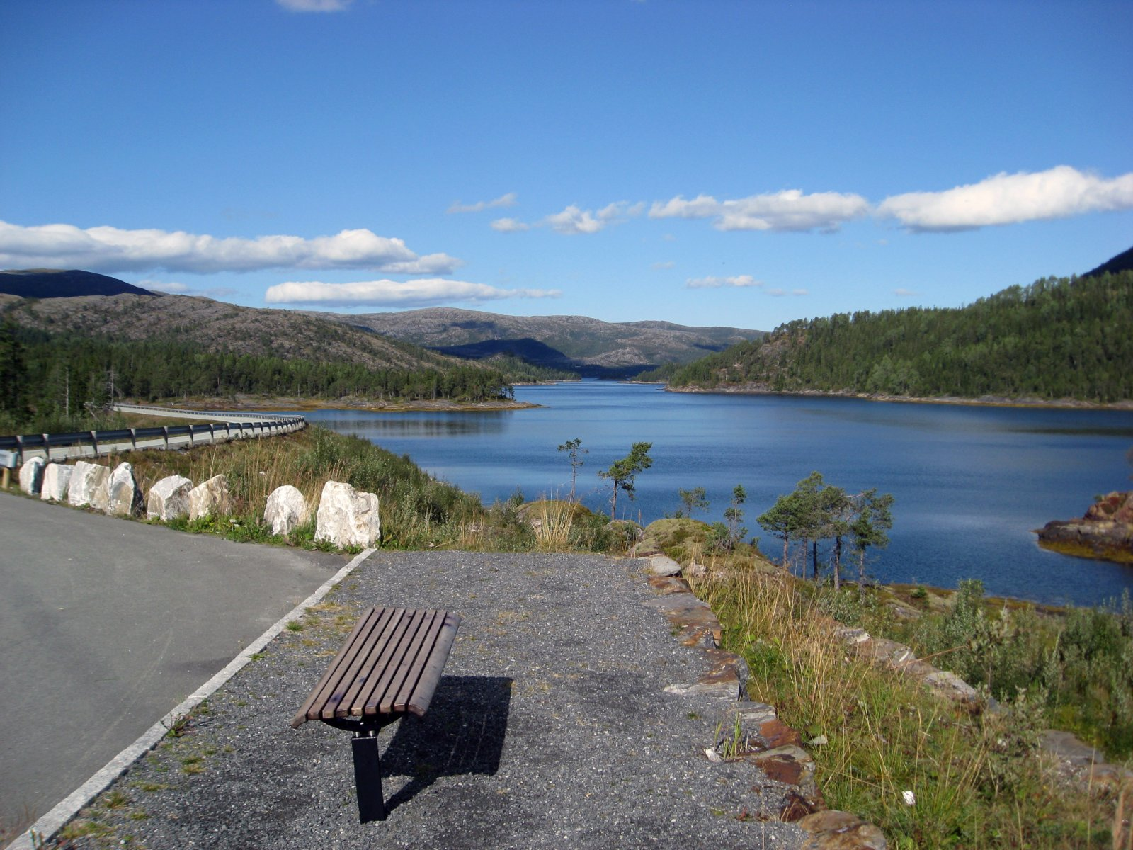 Sørfjorden i Velfjord, Nordland fylke.